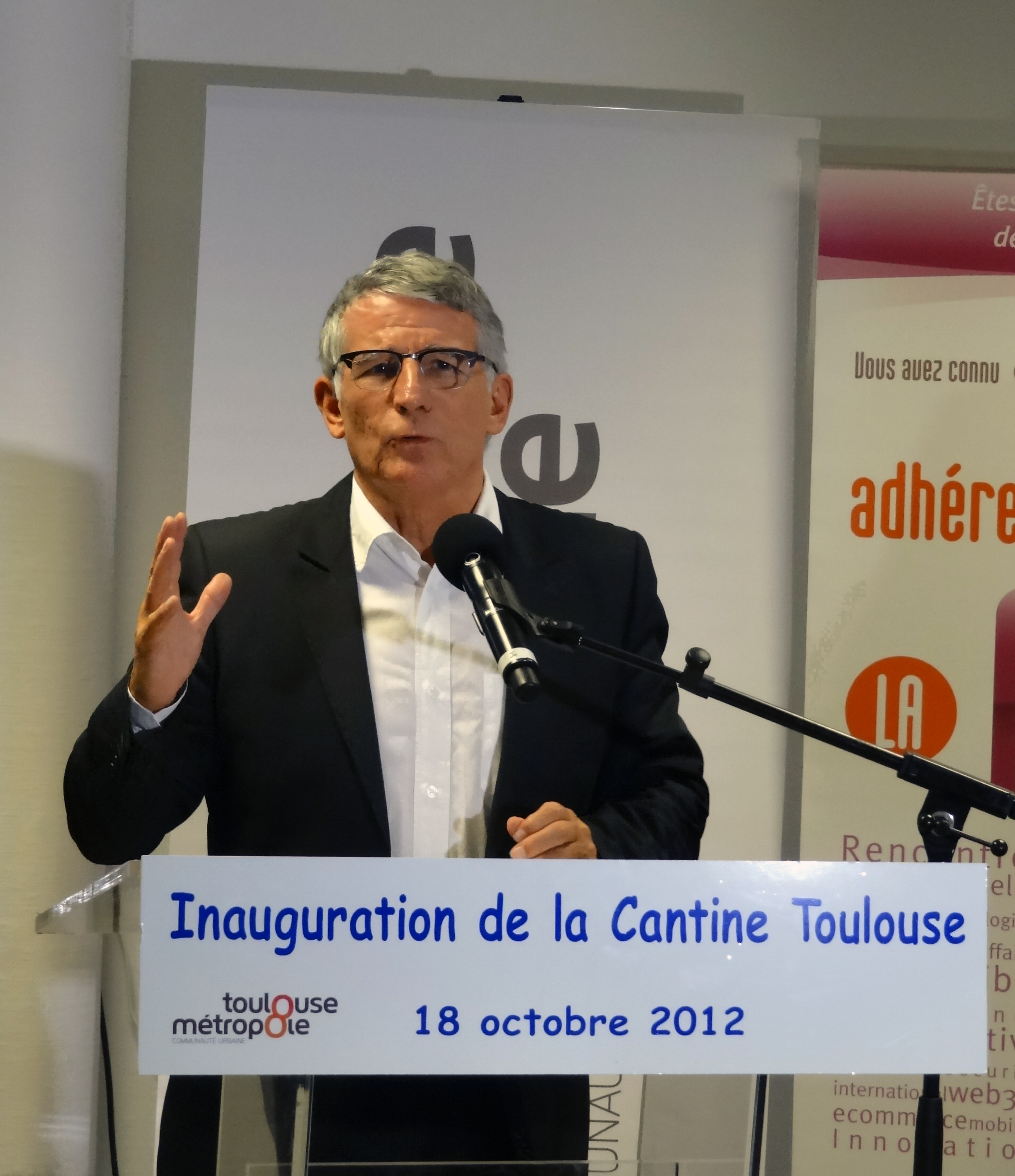 Pierre Cohen à l'inauguration de la Cantine de Toulouse